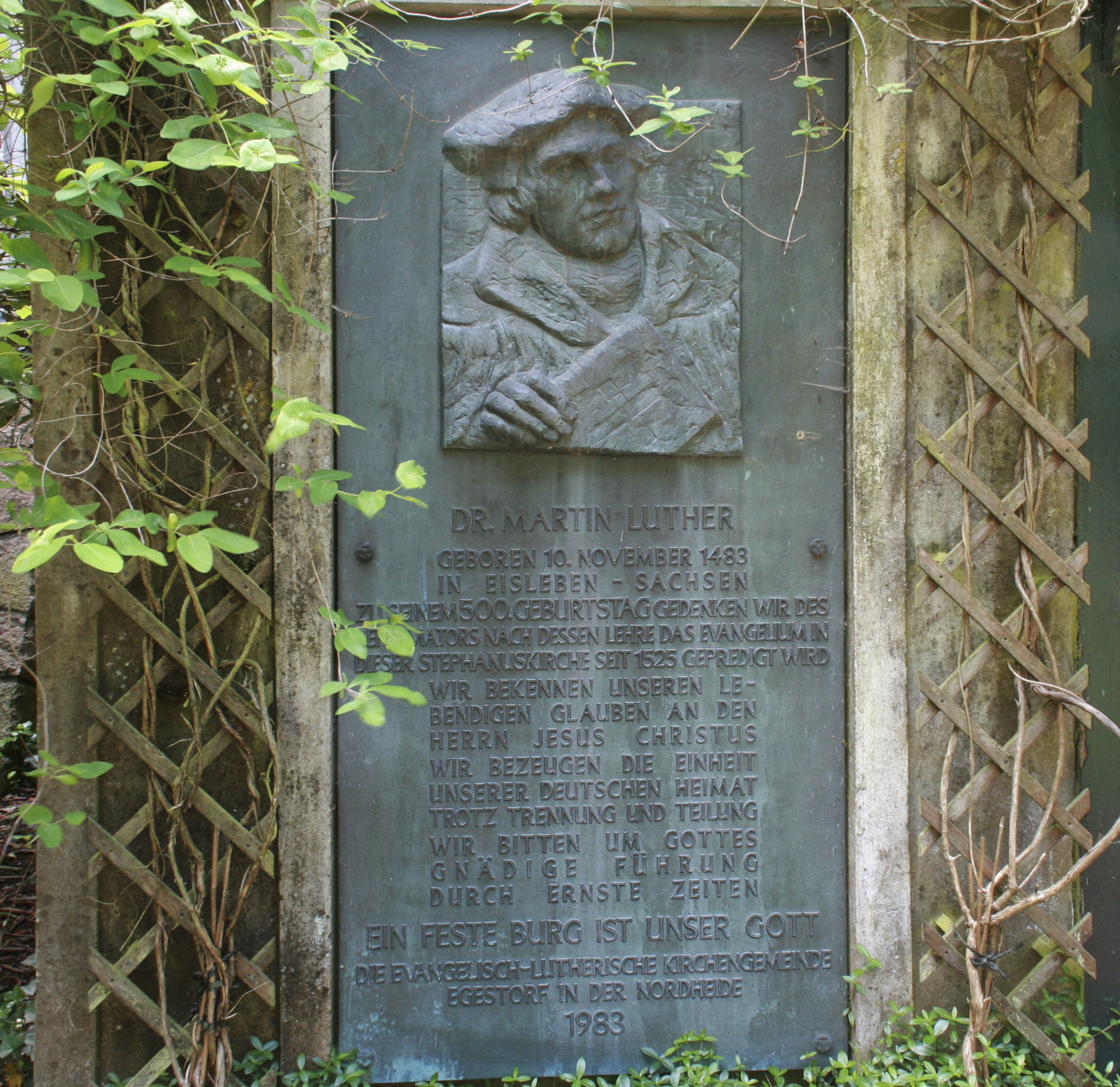 Sankt Stephanus in Egestorf